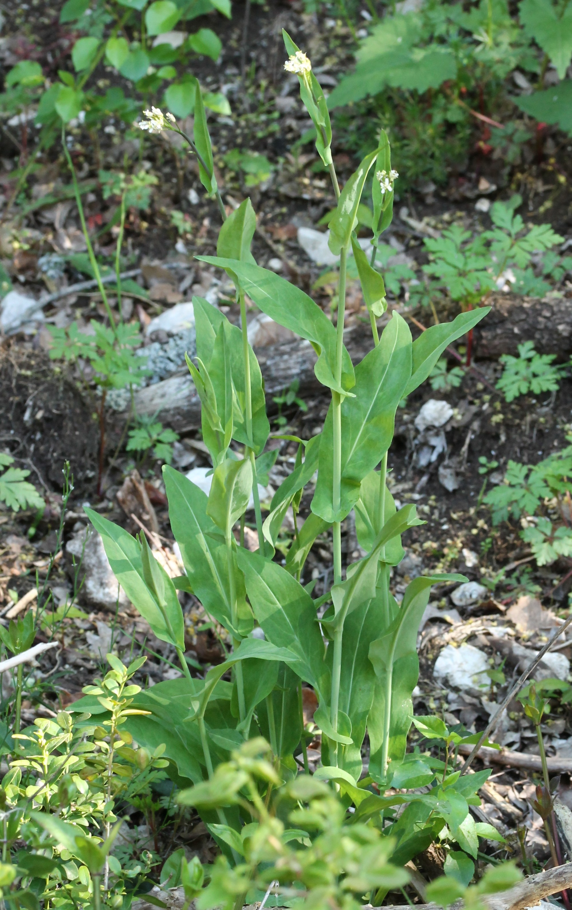 Fourraea alpina (L.) Greuter & Burdet